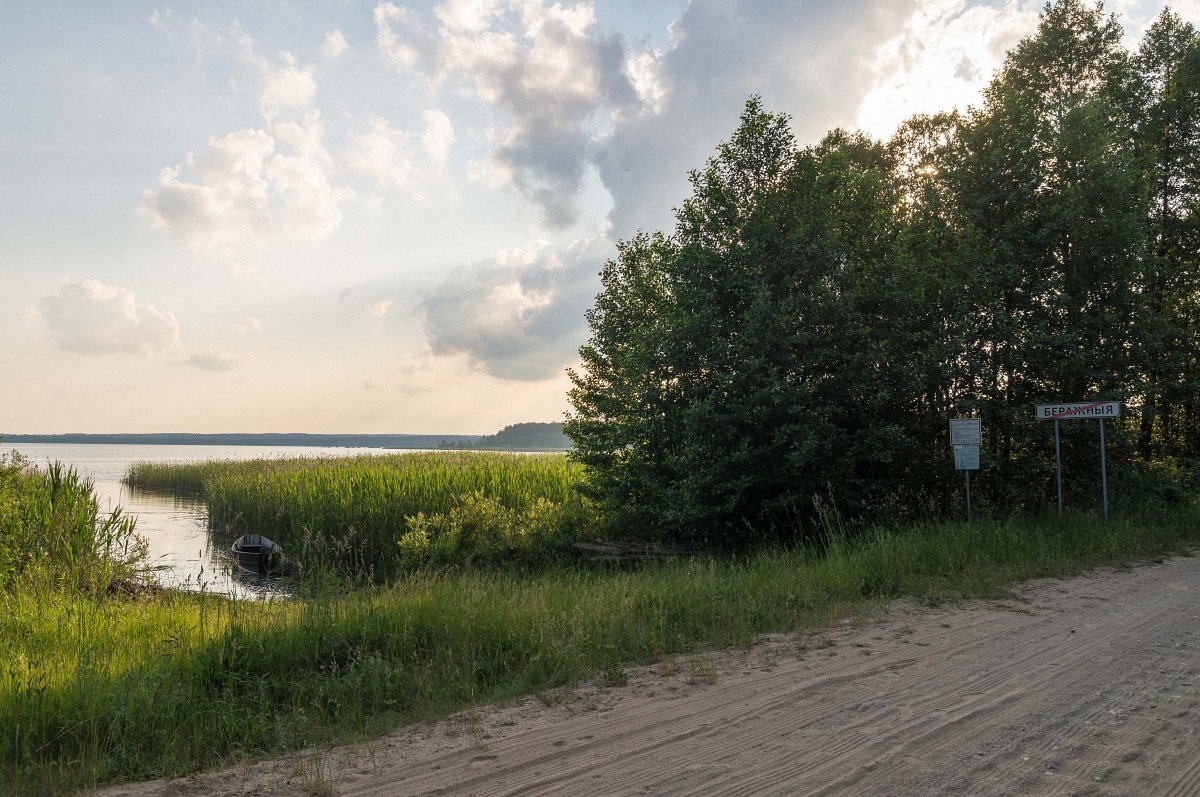 Вішнеўскае возера